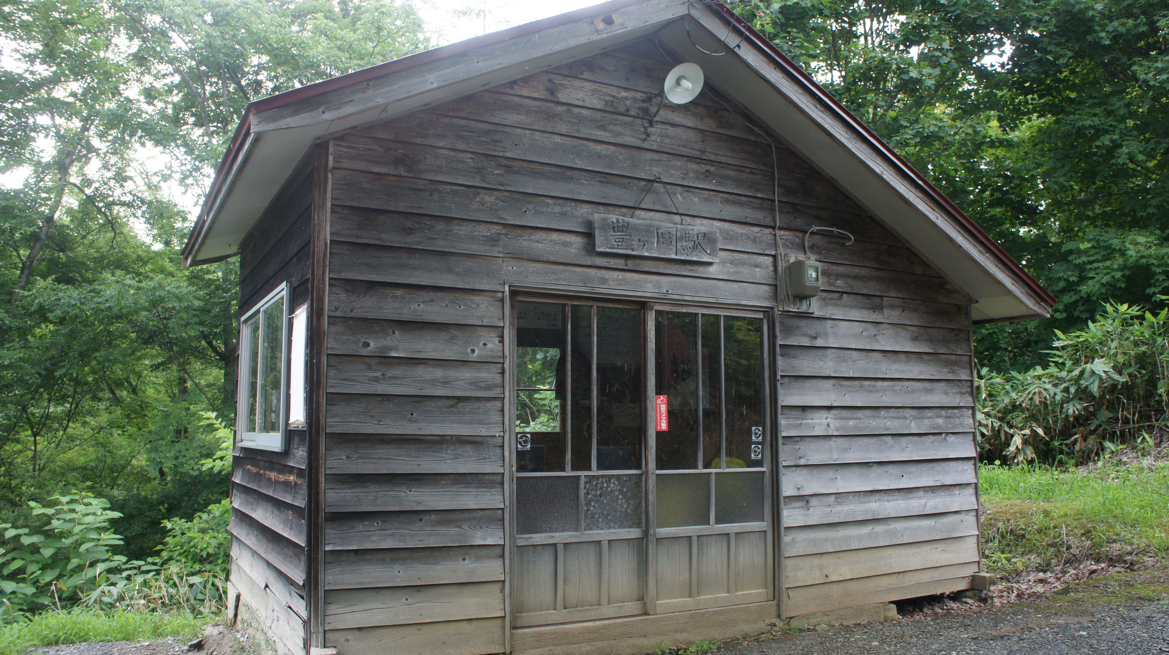 JR札沼線・豊ヶ岡駅の駅舎